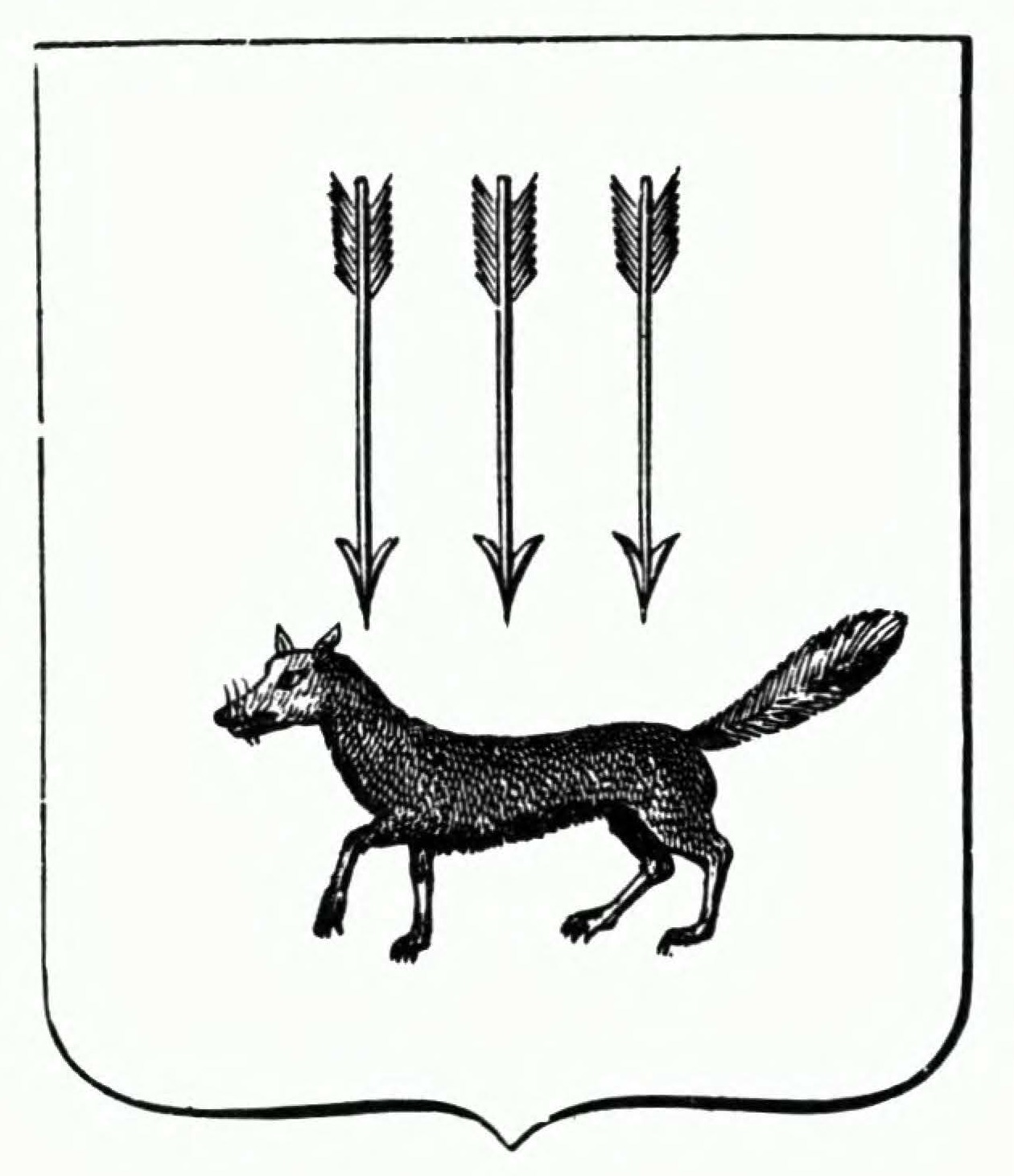 Герб Саранска Пензенской губернии (с описанием в гербовнике Винклера)